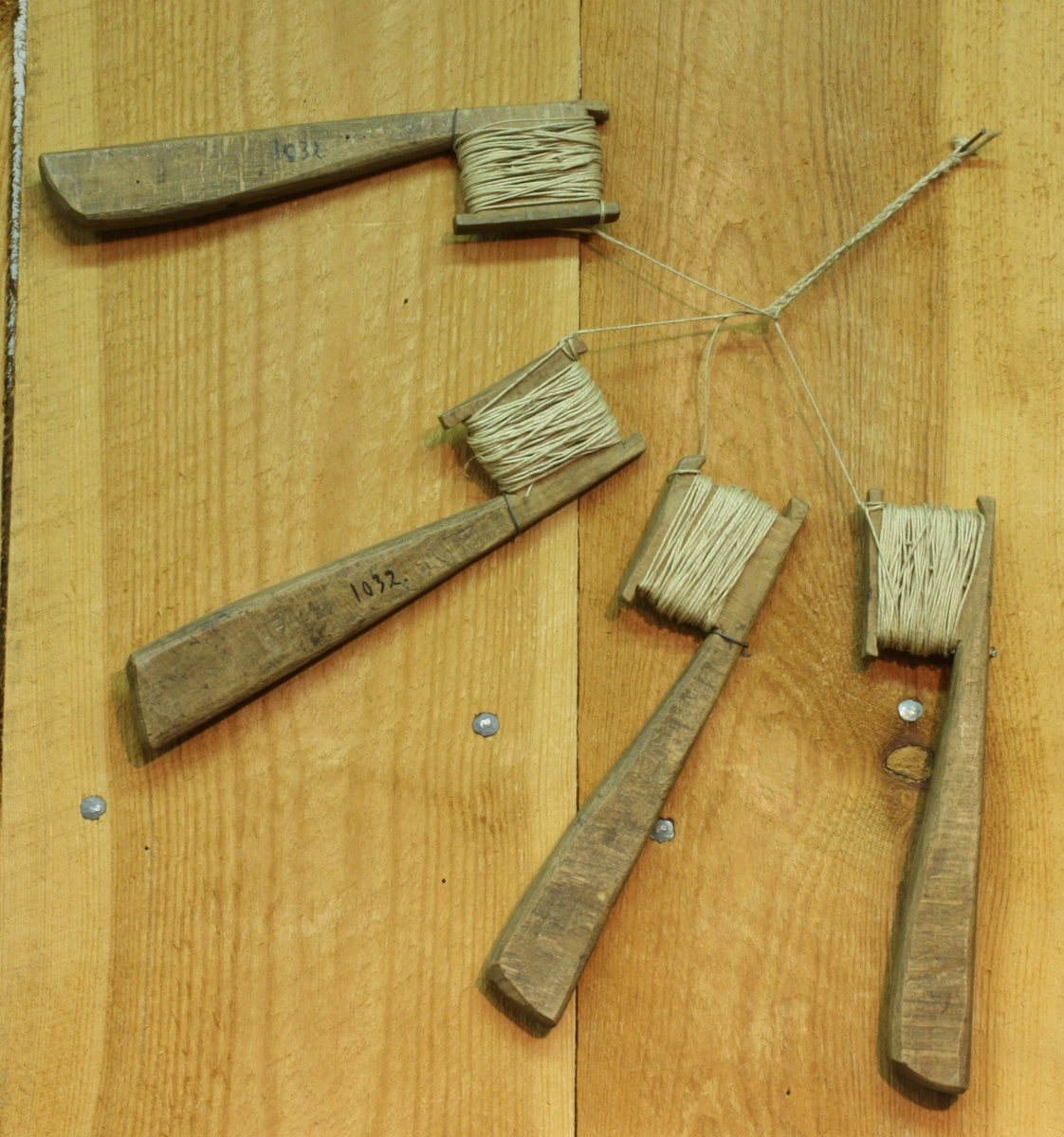 Forsynkroker, tradisjonelle redskaper brukt til fremstilling av fiskeliner, spesielt forsyn (=line fra rygglina ned til fiskekroken). Teknikk: Slingring. Redskapene ble også kalt garnsneller/slingrestokker/slyngestokker.